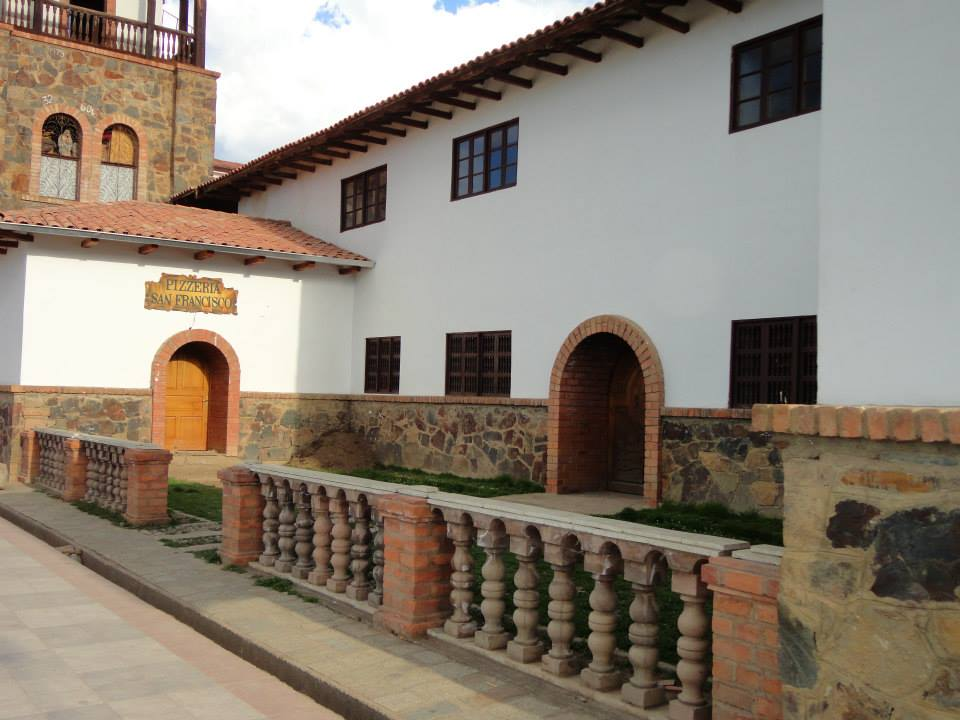 Pizzeria San Francisco - Chacas